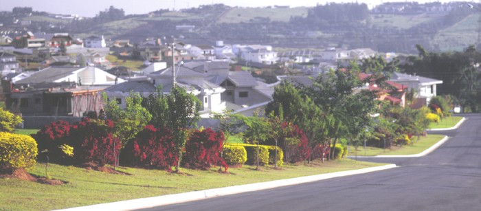 Foto do loteamento no Alphaville Campinas